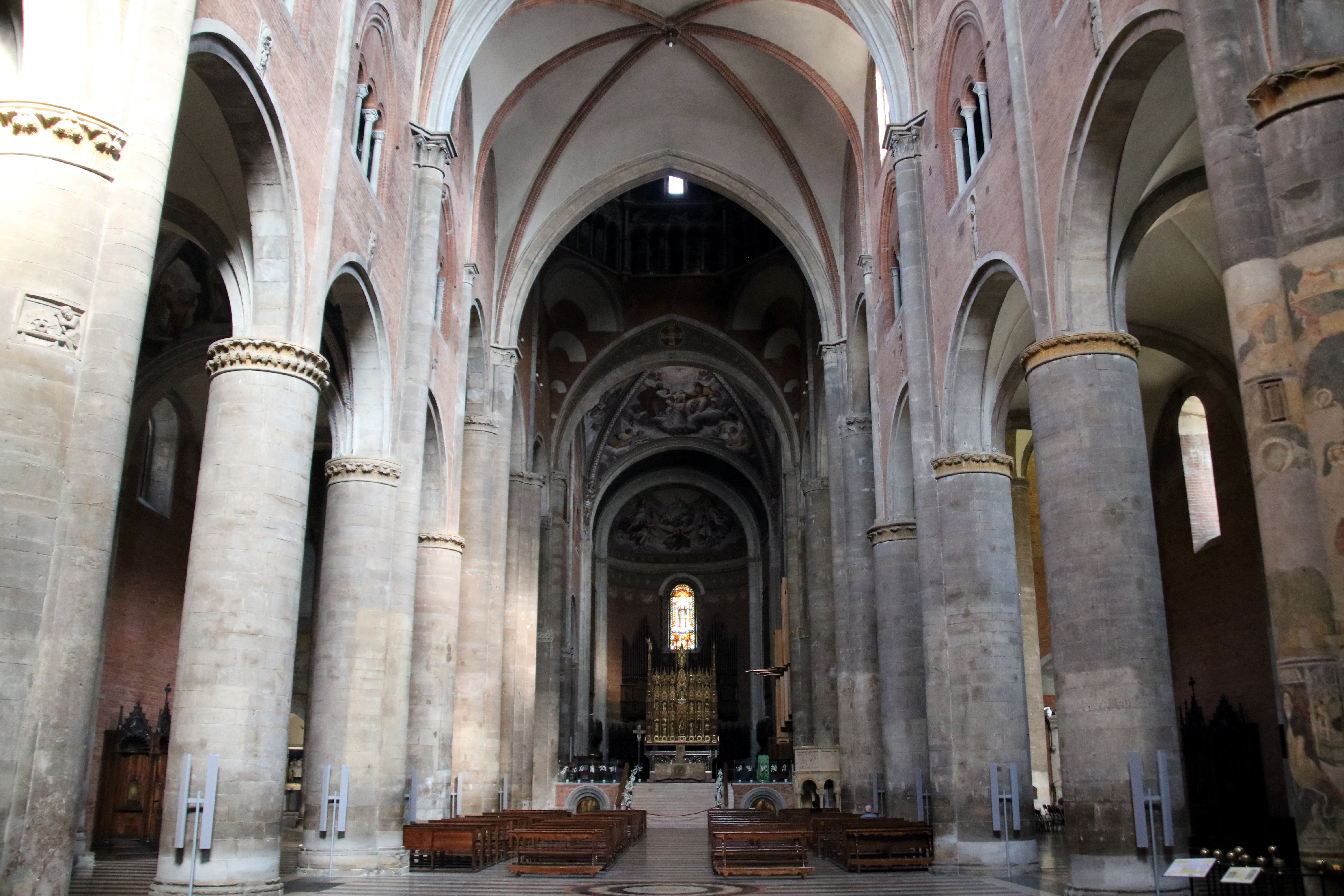 duomo di Piacenza This is a photo of a monument which is part of cultural heritage of Italy.